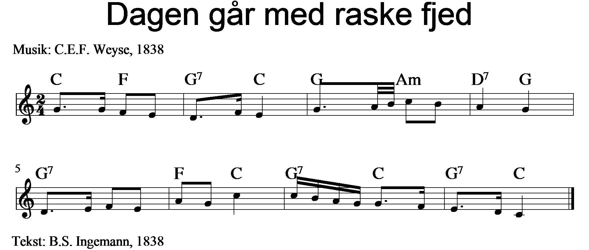 Dagen går med raske fjed.